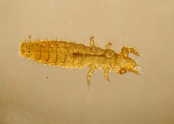 Protura specimen, taken under stereo microscope (40x). Acerentomon sp.